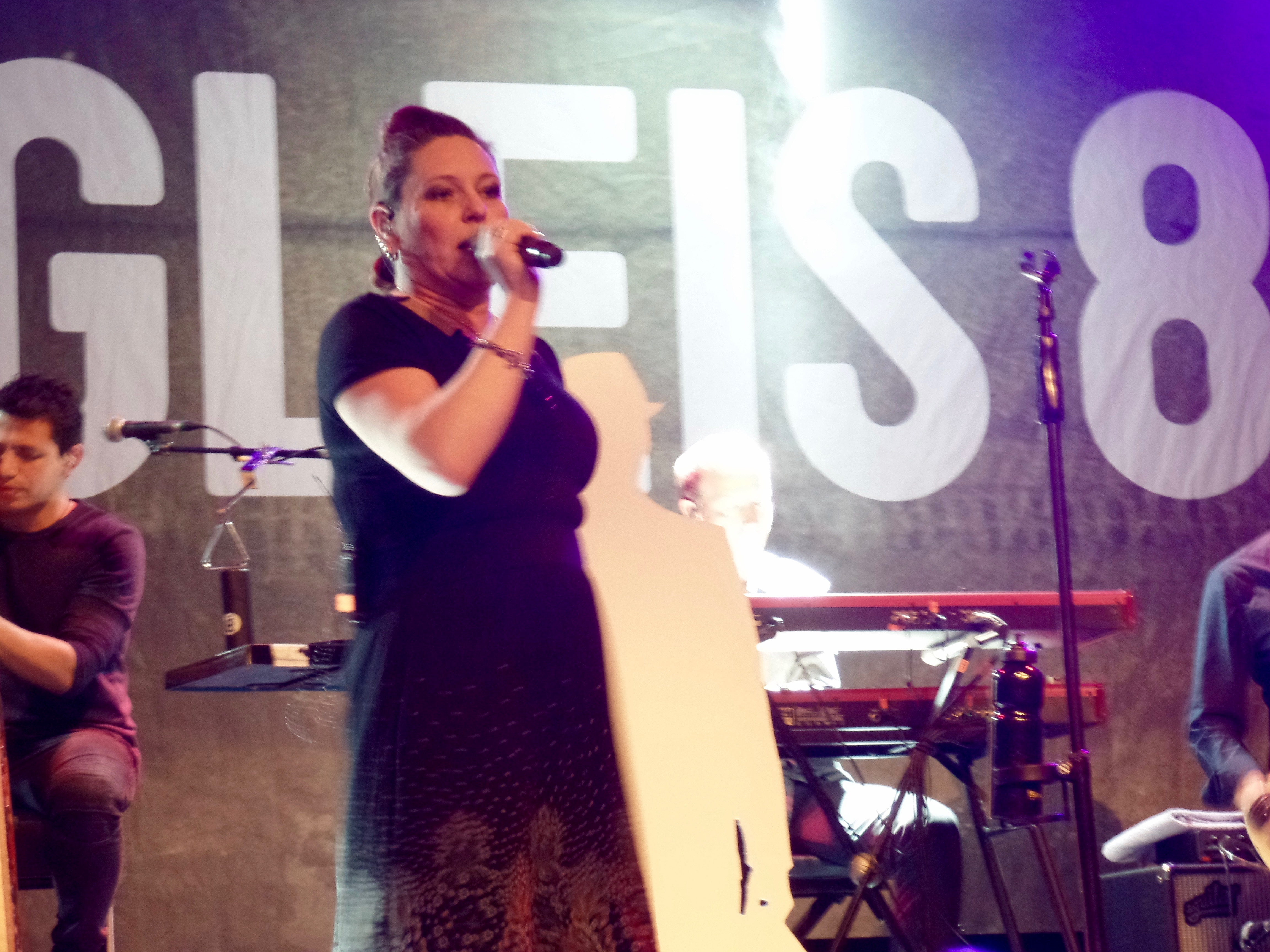 Gleis 8 während ihres Konzerts in Oldenburg